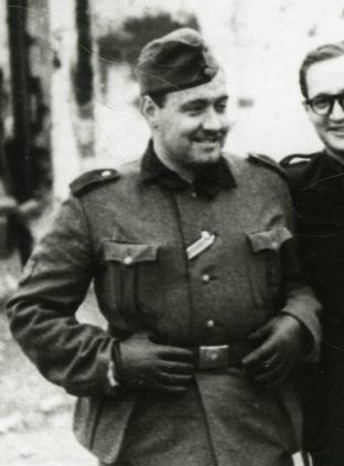 Agustín Aznar (aproximadamente 1941-1943)